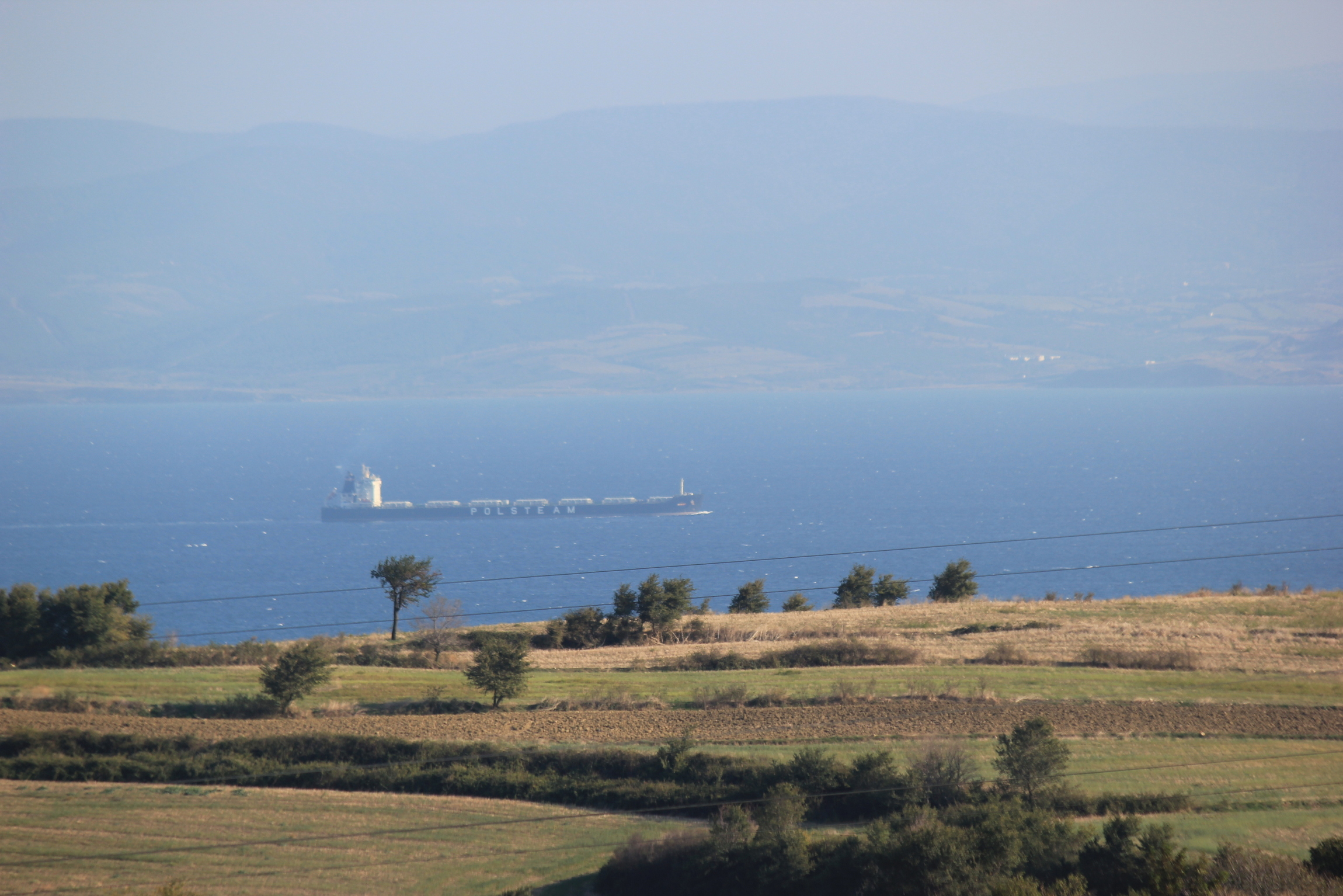 Blick über die Dardanellen bei Gallipoli (von Europa nach Asien).